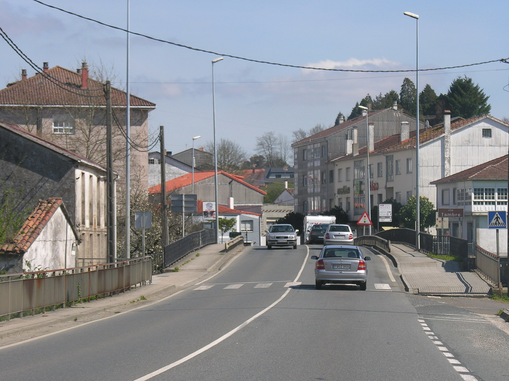 N-550 no concello de Oroso(Galicia